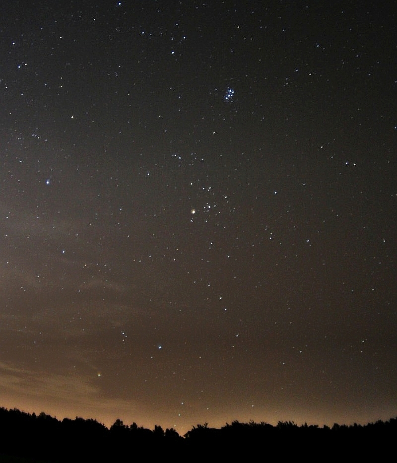 Sternbild Stier am Nachthimmel.